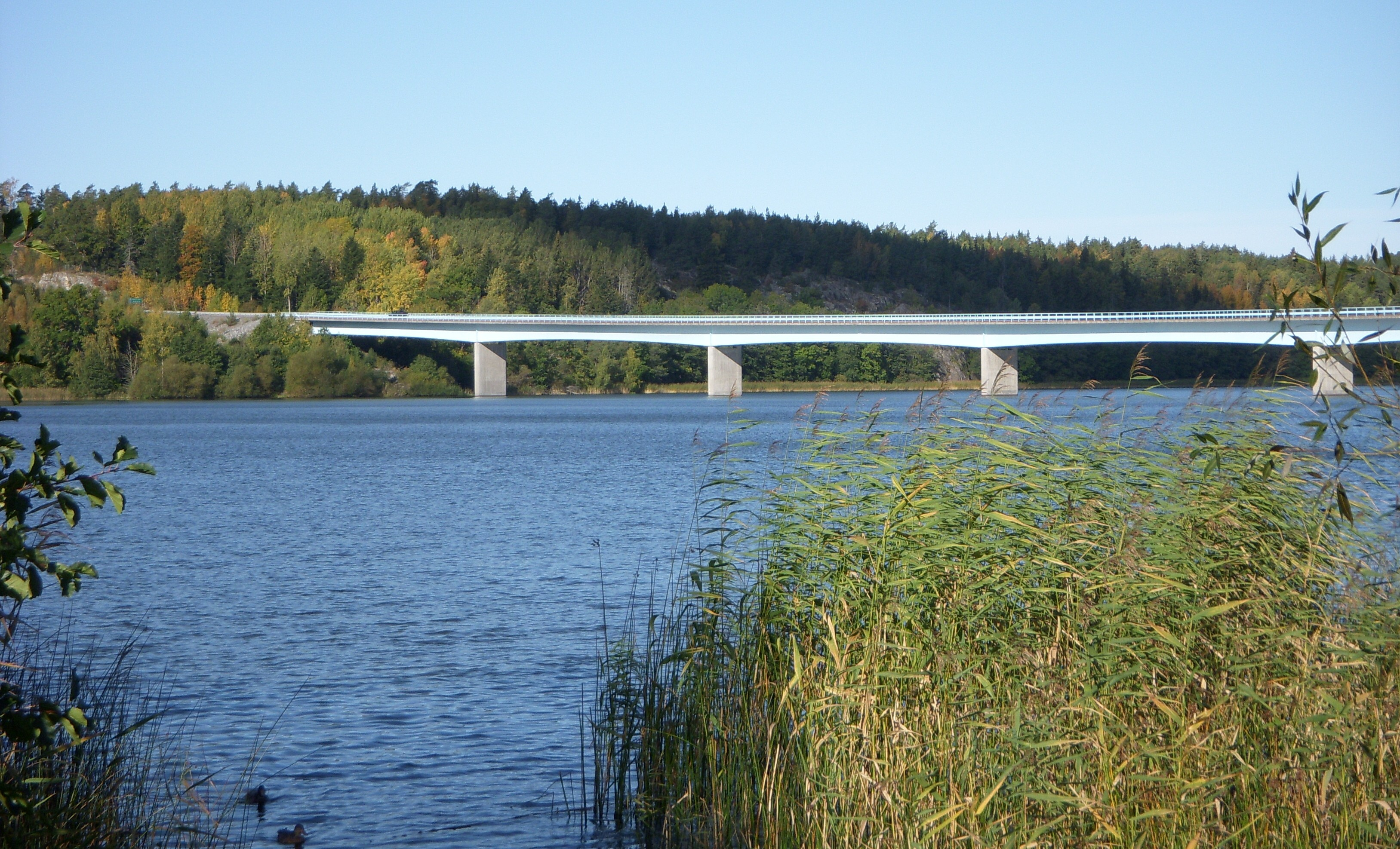 Ekolsundsbron (norra) i Enköpings kommun